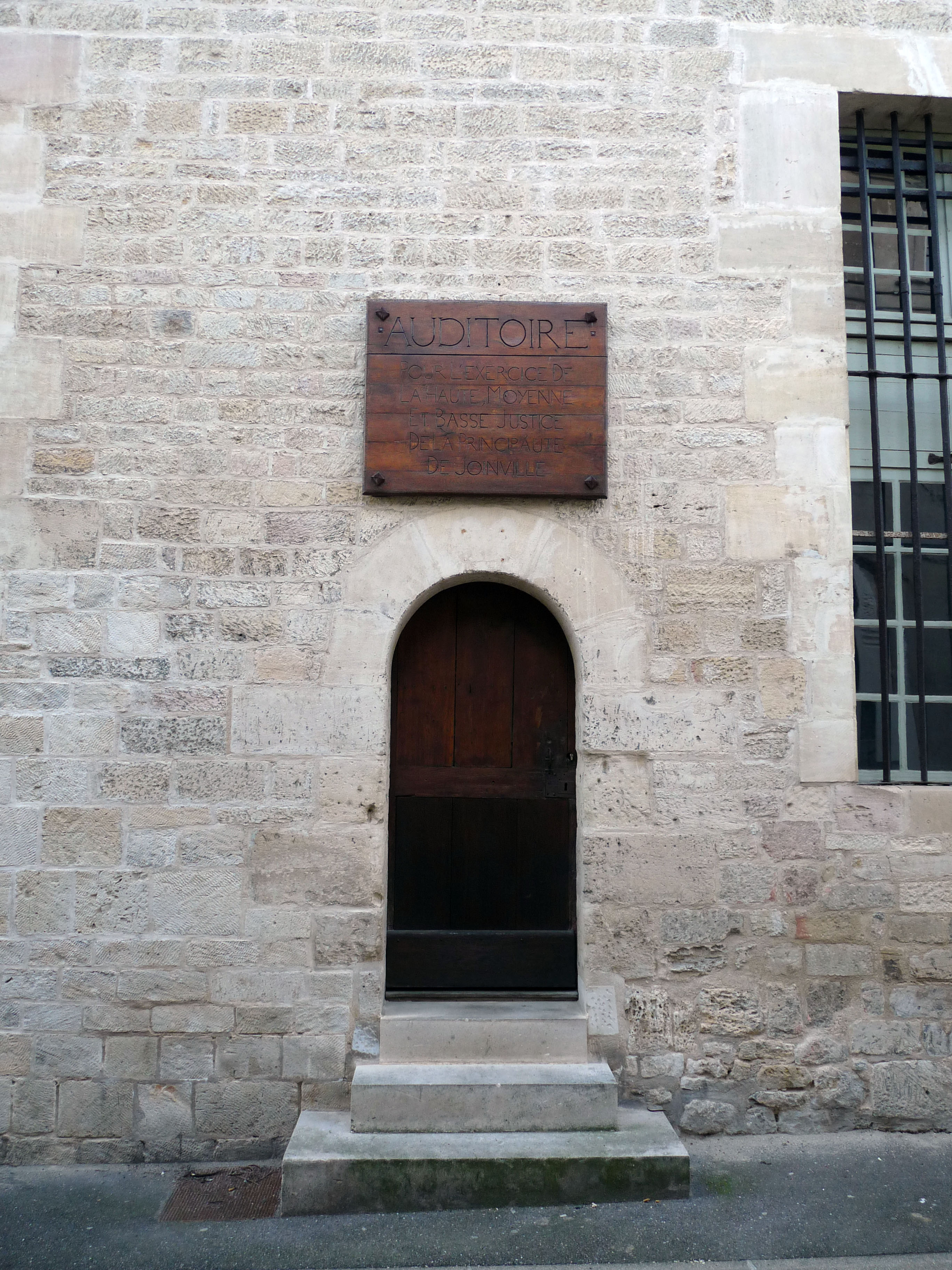 Auditoire de Joinville (Haute-Marne)